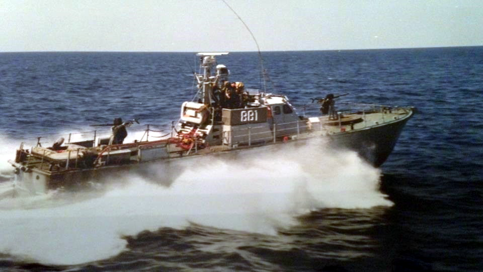 דבור 881 שהשתתף בפעילות אבטחה ותפיסת סירות מחבלים רבות בינהן ה'קסלרדי' באוגוסט 1985